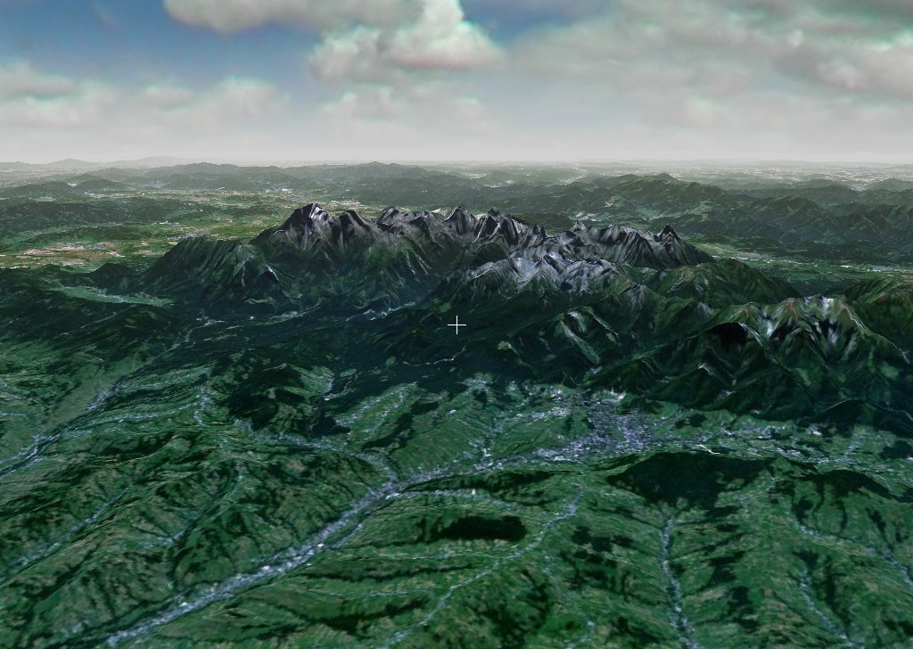 NASA World Wind - widok na Tatry i Zakopane (NLT Landsat Visible) (chmury i mgła widoczne dzięki zastosowaniu pluginu [1])